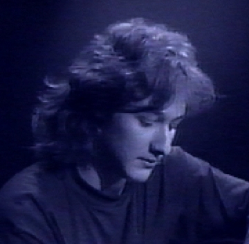 Marek Brezovský Licensing Opis = Marek Brezovský zdroj: Rodina Brezovská, osobne Rodičia Mareka Brezovského povoľujú použitie tohto obrázka celosvetovo.